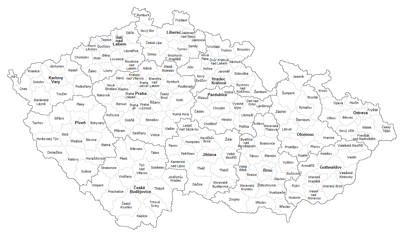 Mapka českých krajů a okresů k roku 1950. Vychází ze stavu podle zákona č. 280/1948 Sb., o krajském řízení, a vládního nařízení č. 3/1949 Sb., o územní organisaci okresů v českých zemích. Zpracováno také podle Hledíková, Z., Janák, J., Dobeš, J. Dějiny správy v českých zemích. Od počátků státu po současnost. Praha: Nakladatelství Lidové noviny, 2005. Města Praha, Plzeň, Liberec, Brno, Olomouc, Opava a Ostrava jsou samostatná a zároveň jsou sídly vlastních okresů.